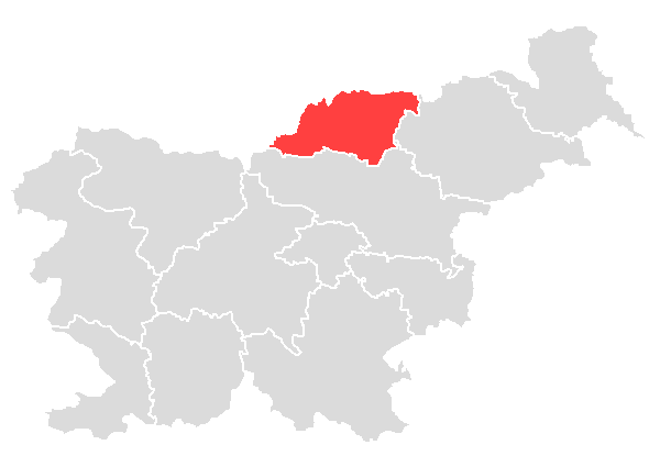 SURS